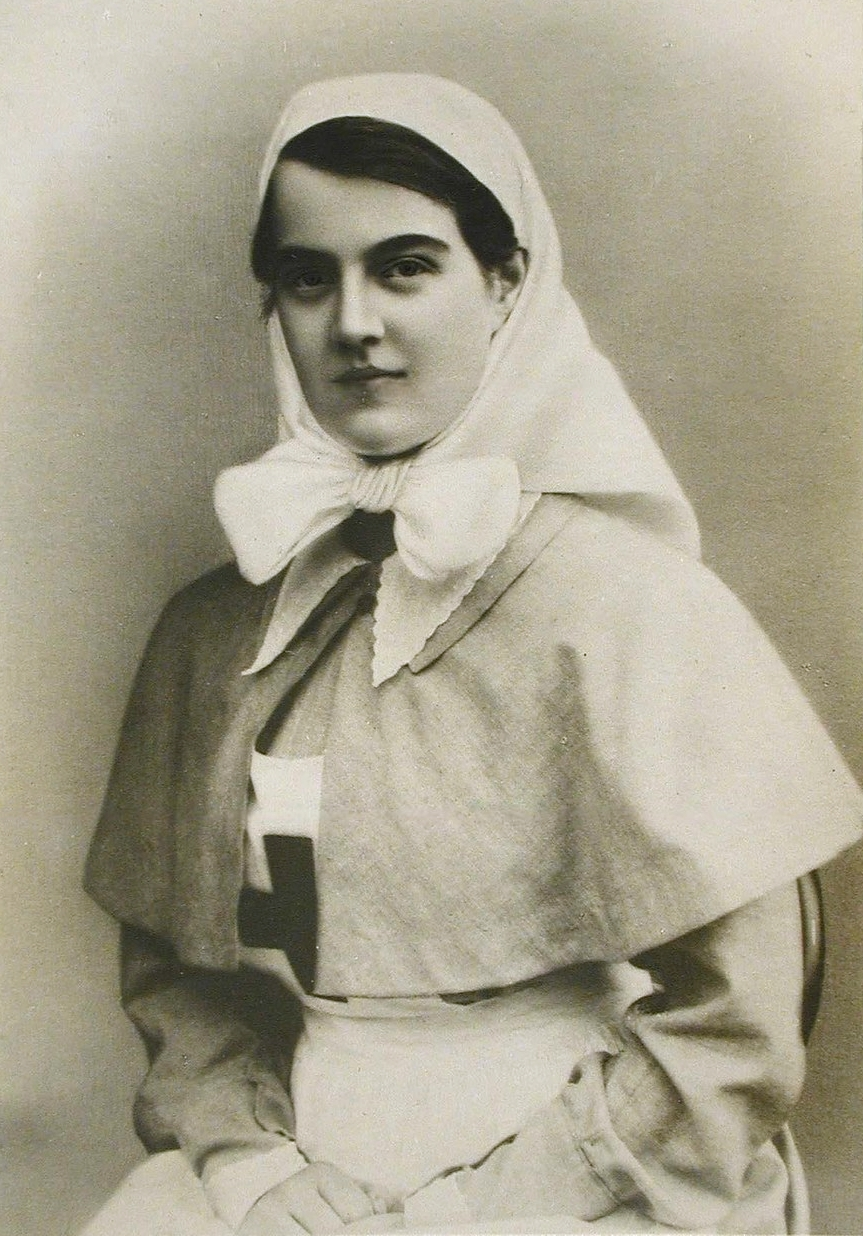 Мария Павловна — сестра милосердия общины Святой Евгении